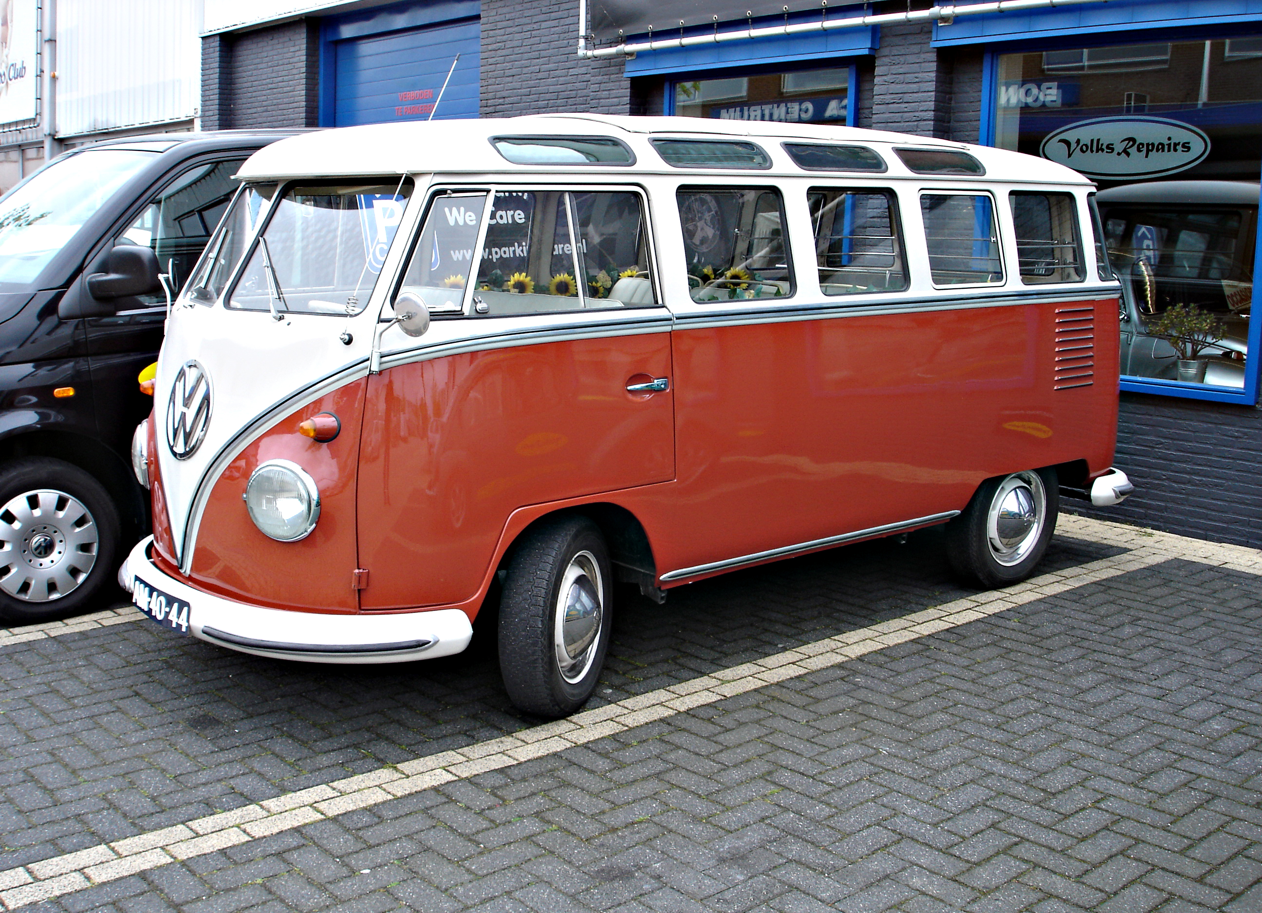 VW Samba bus in Pijnacker.